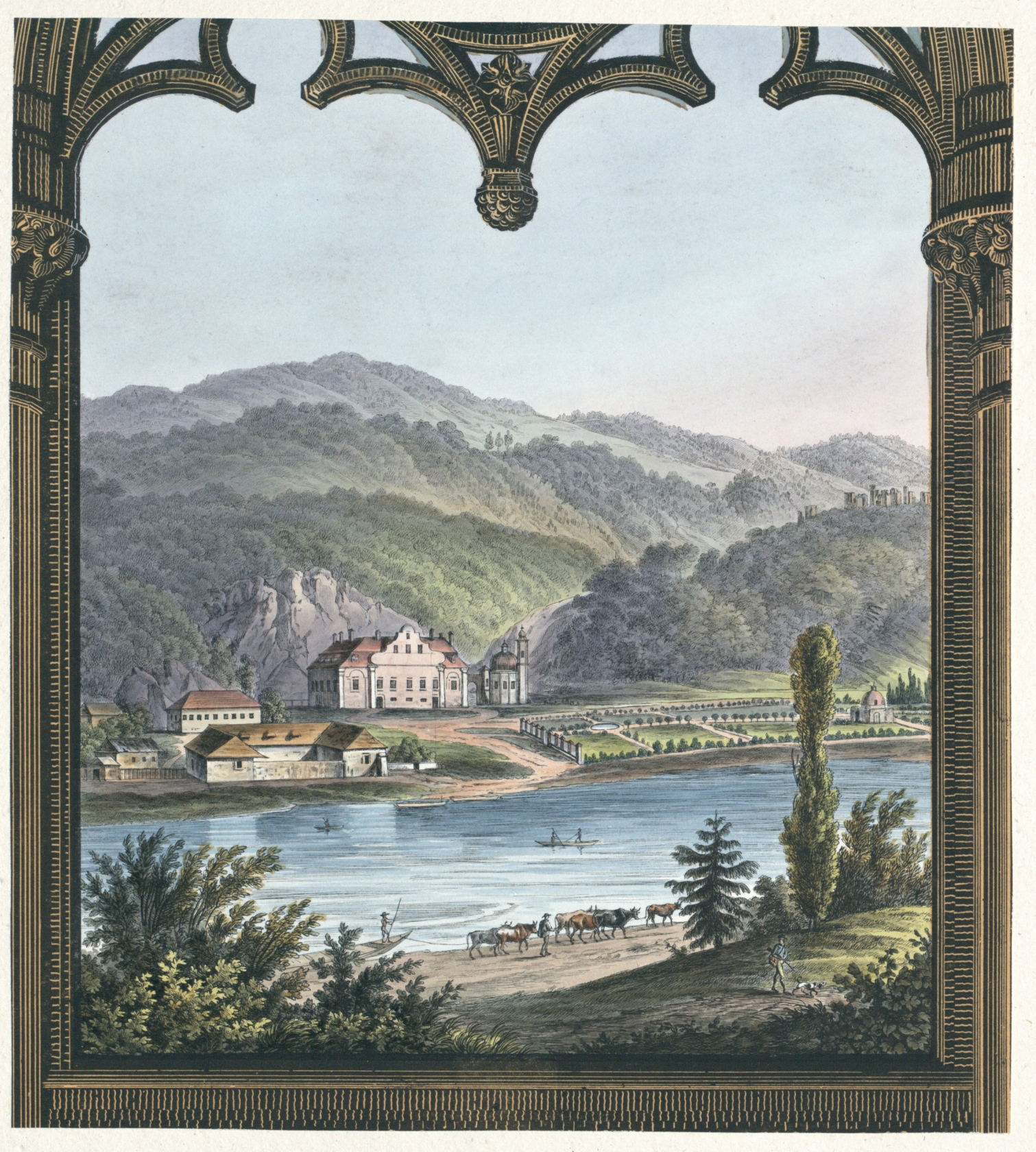 Boštanj